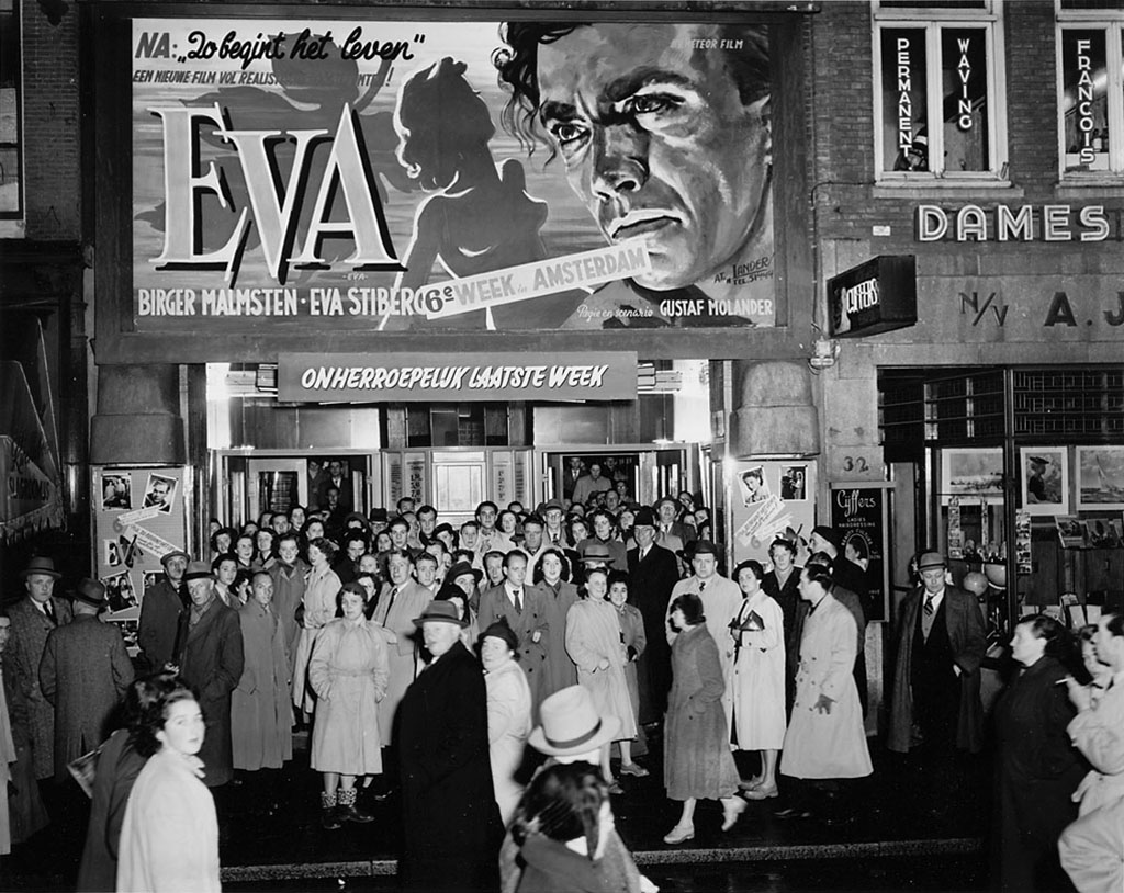 Drukte bij bioscoop Nöggerath bij het uitgaan van de film 'Eva' (regie: Gustaf Molander, 1948 met Birger Malmsten en Eva Stiberg), Reguliersbreestraat, Amsterdam, 21 november 1951. Foto Ben van Meerendonk / AHF, collectie IISG, Amsterdam